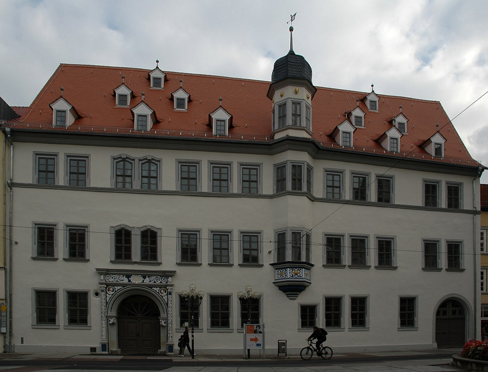 Haus Dacheröden (errichtet 1557) am Angerbrunnnen in Erfurt